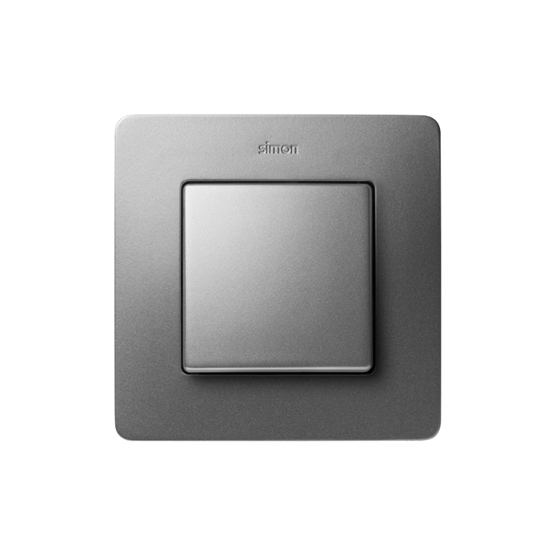 Łącznik jednobiegunowy serii Simon Detail 82. Nazwa producenta: KONTAKT - SIMON Spółka Akcyjna.